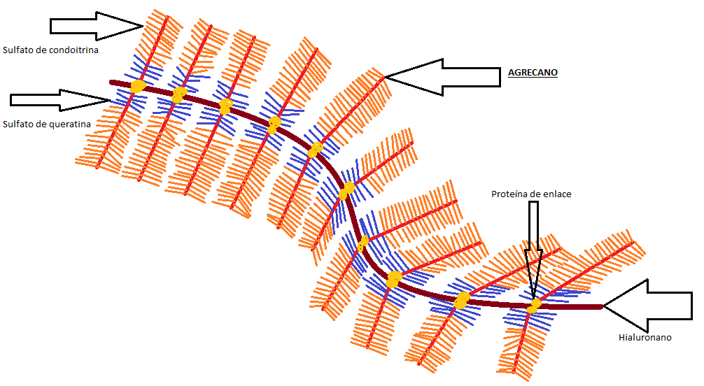 molècula de agrecà